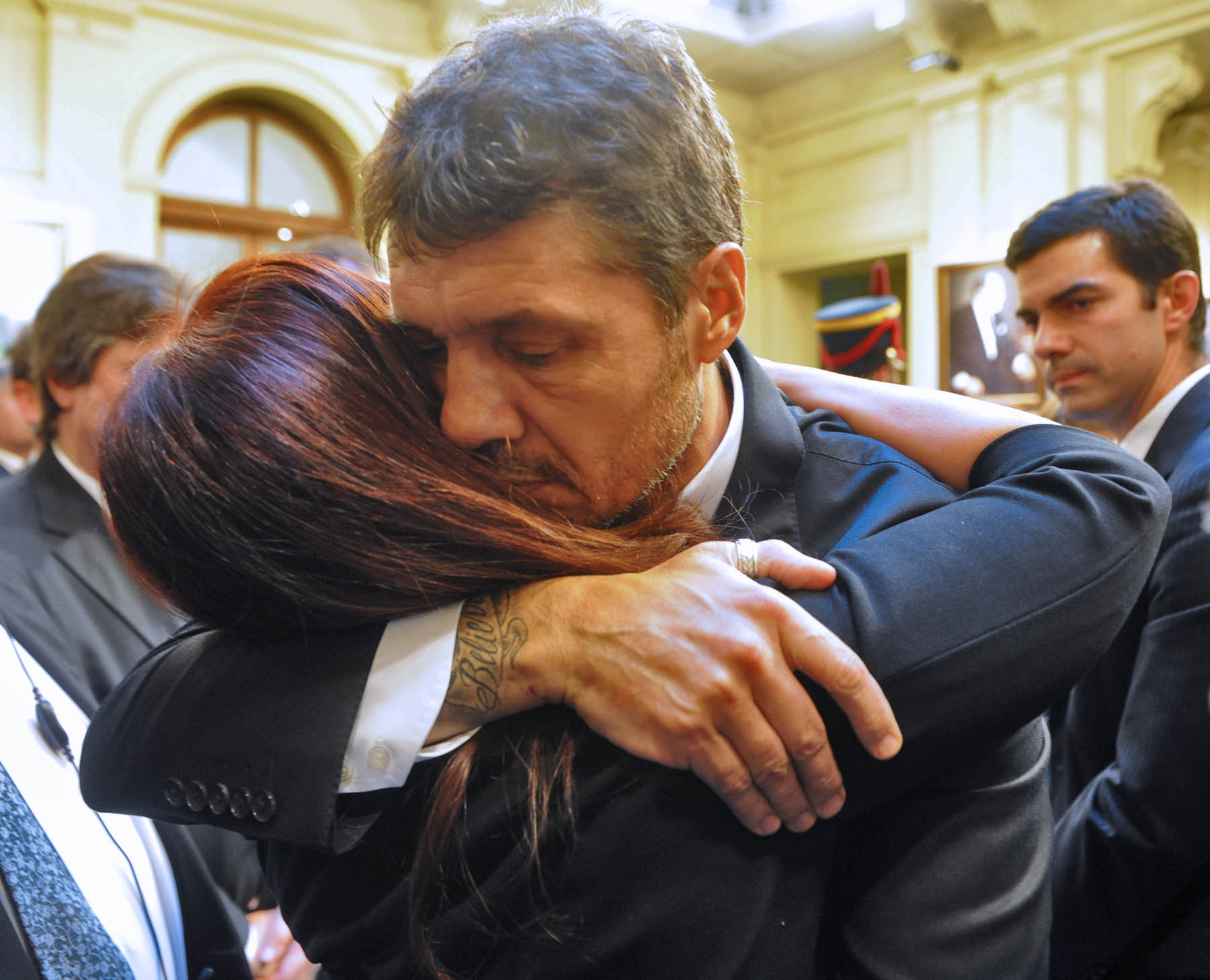 Marcelo Tinelli saluda a la Presidenta Cristina Fernandez durante funeral de Nestor Kirchner